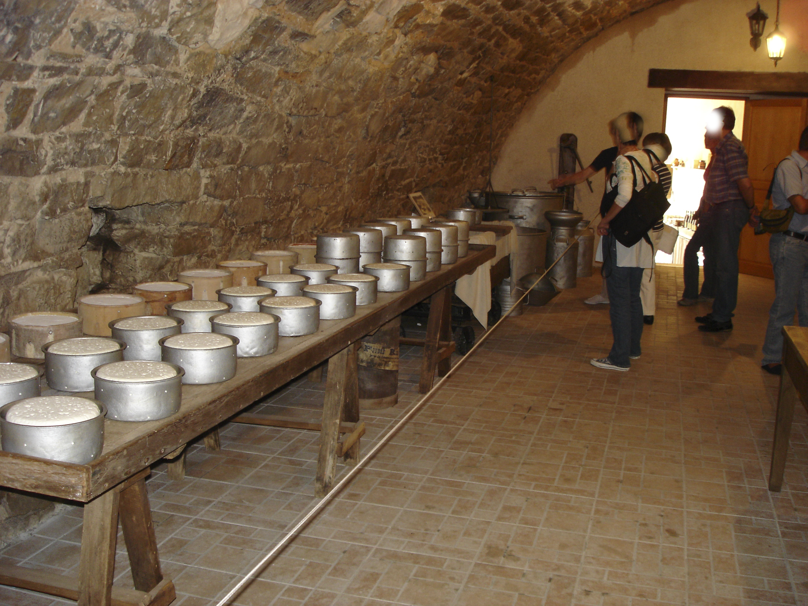 Musée des traditions de Cornus (Aveyron). La laiterie du Roquefort.